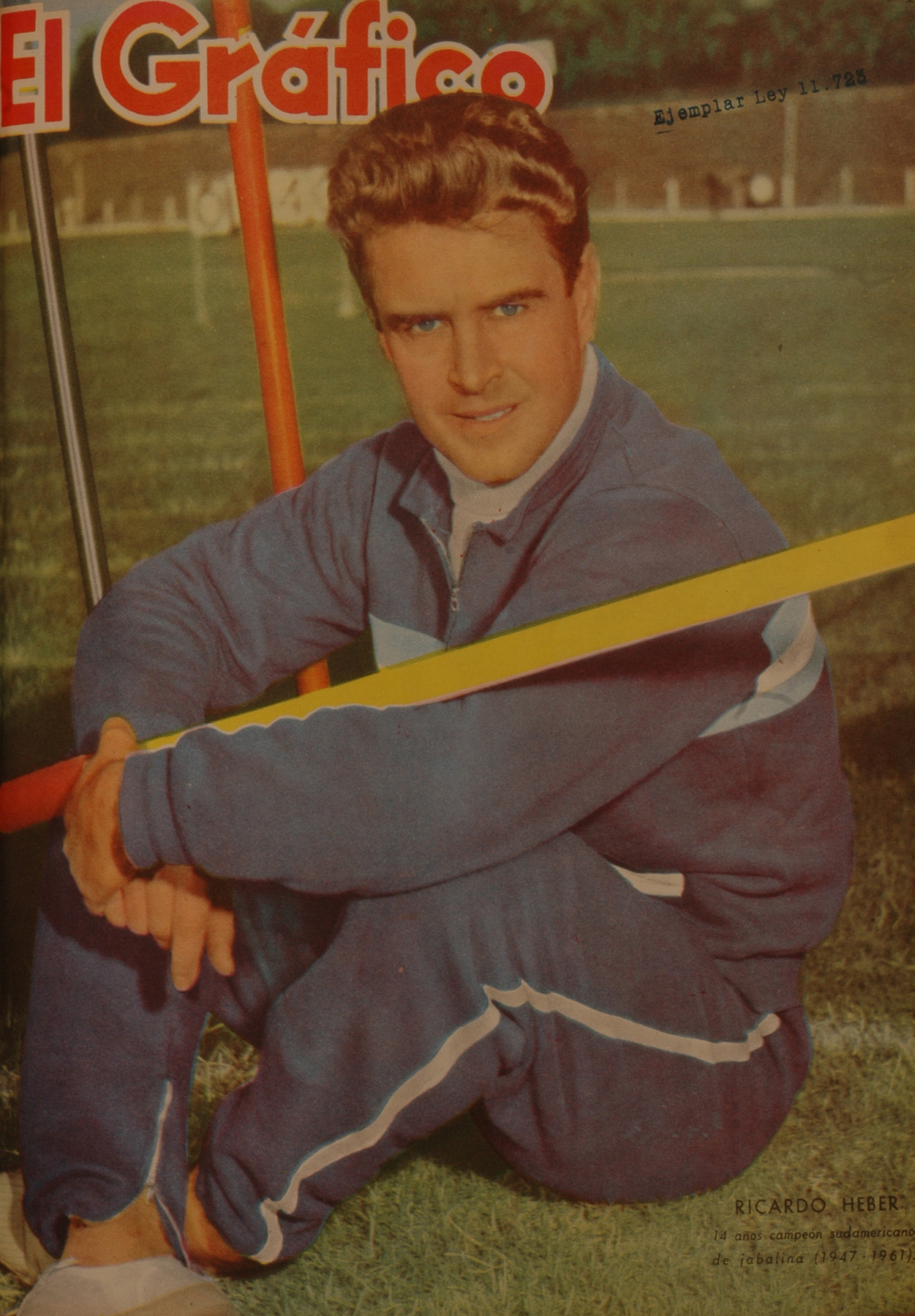 El Grafico del 19 de Julio de 1961. Edicion 2181